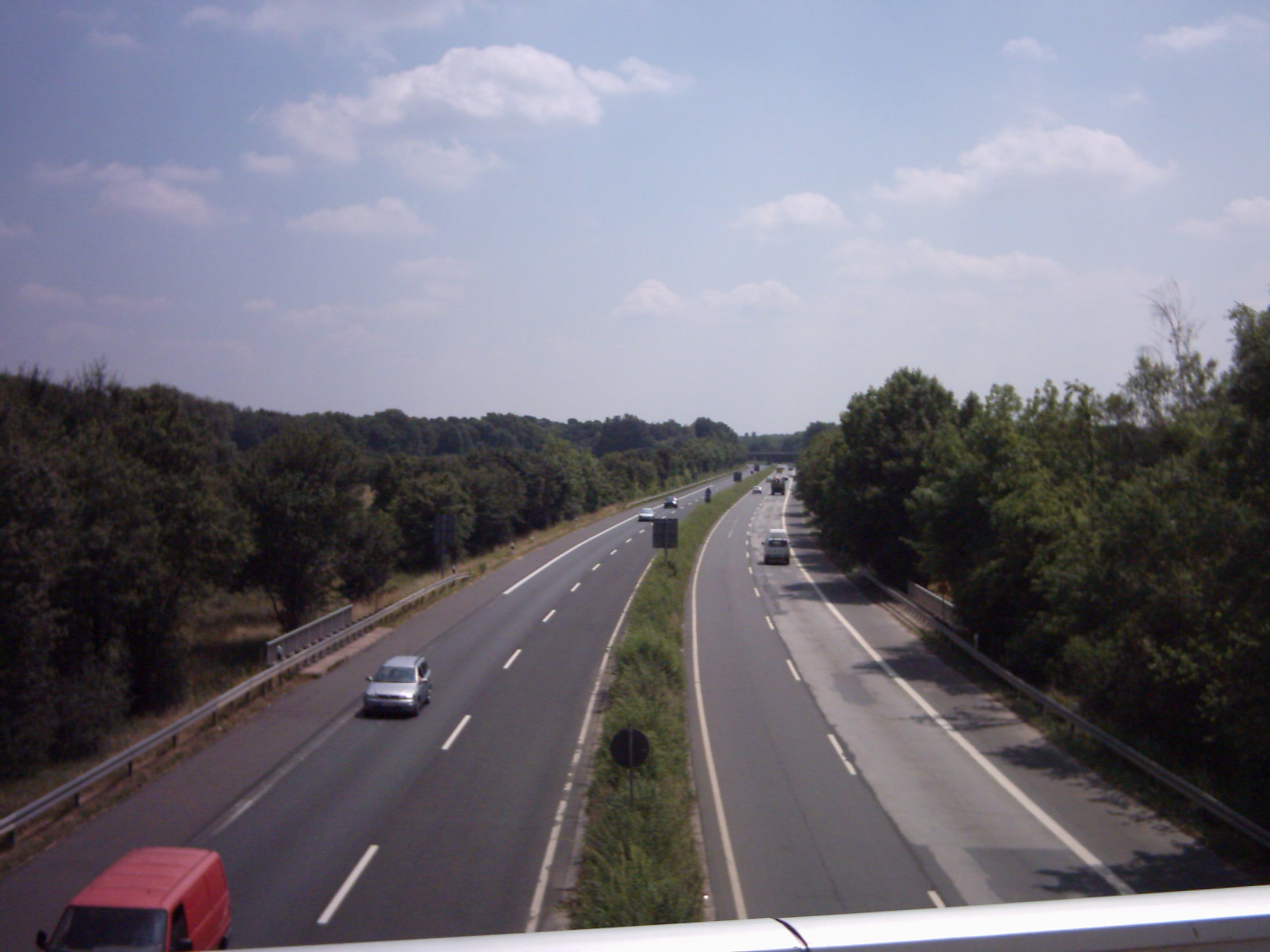 B 448 vom Bieberer Friedhof in Offenbach am Main in Richtung Obertshausen.